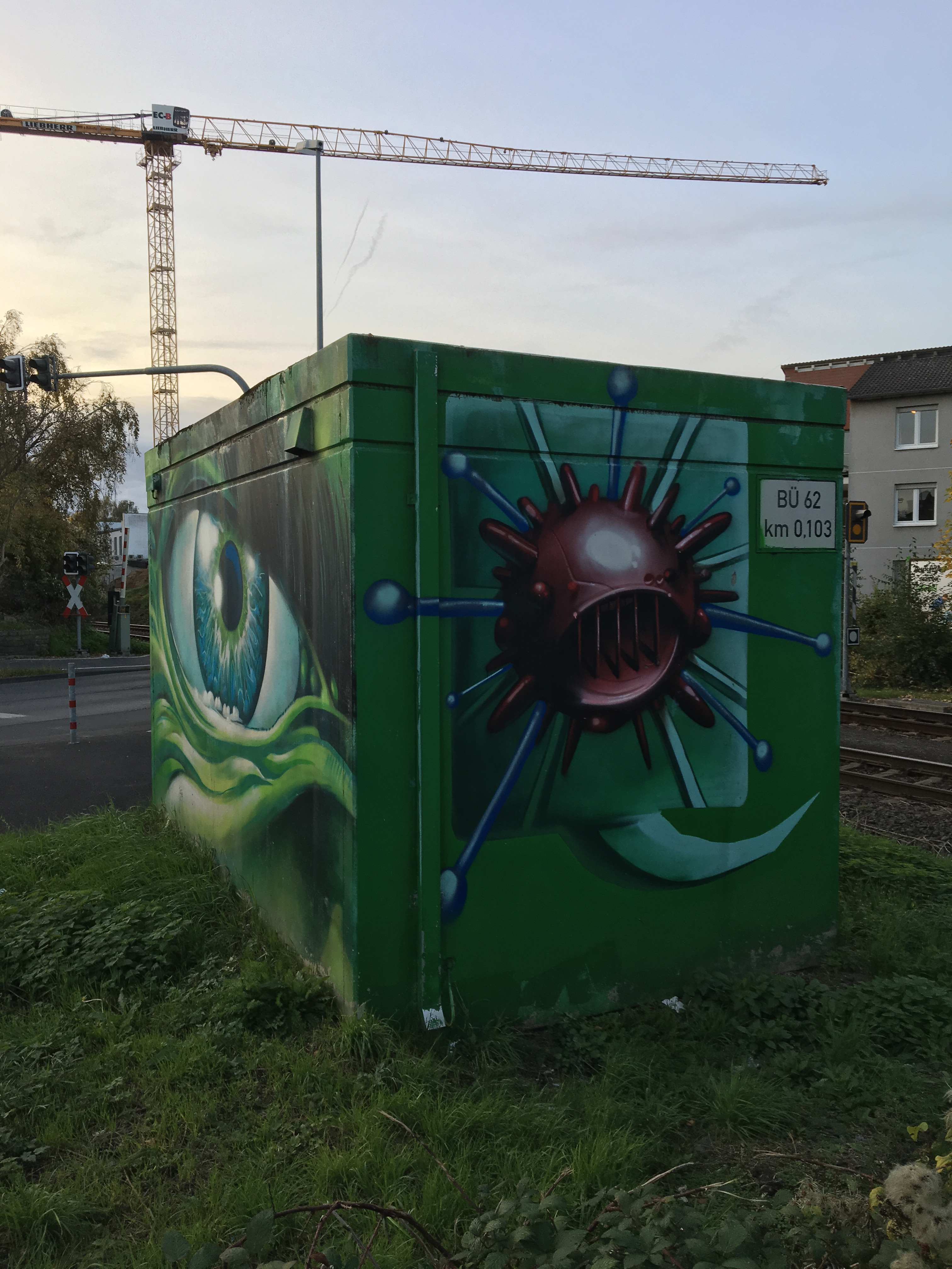 Bild des Grafittikünsterlers Seak an der Bonnstraße in Hürth